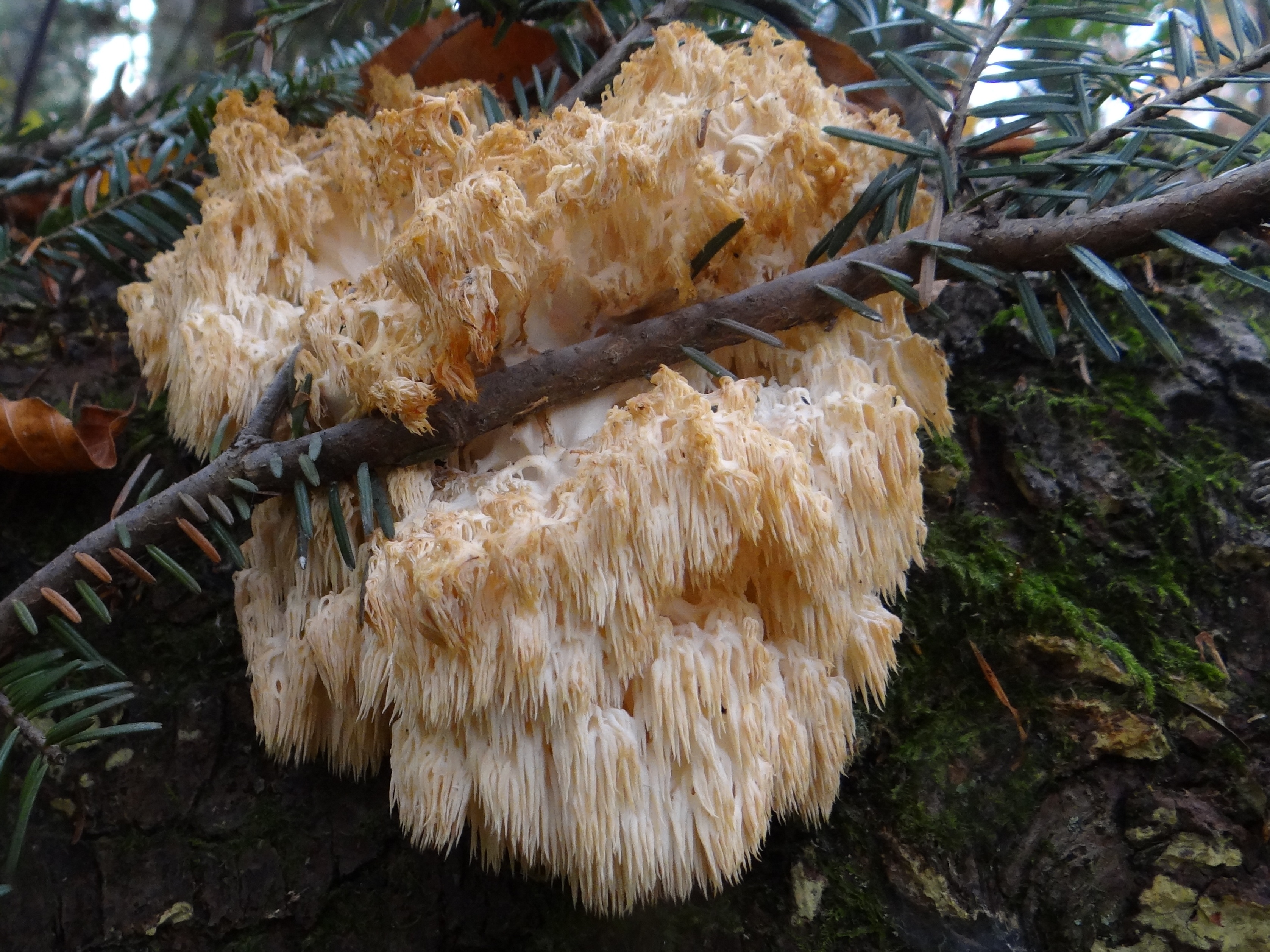 Hericium alpestre (habitat: Gorce, poniżej polany Bieniowe)